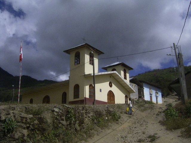 iglesia de Providencia, Luya, Amazonas, Peru